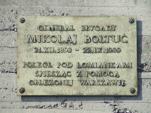 Tablica poświęcona gen. Bołtuciowi na pomniku na Ochocie